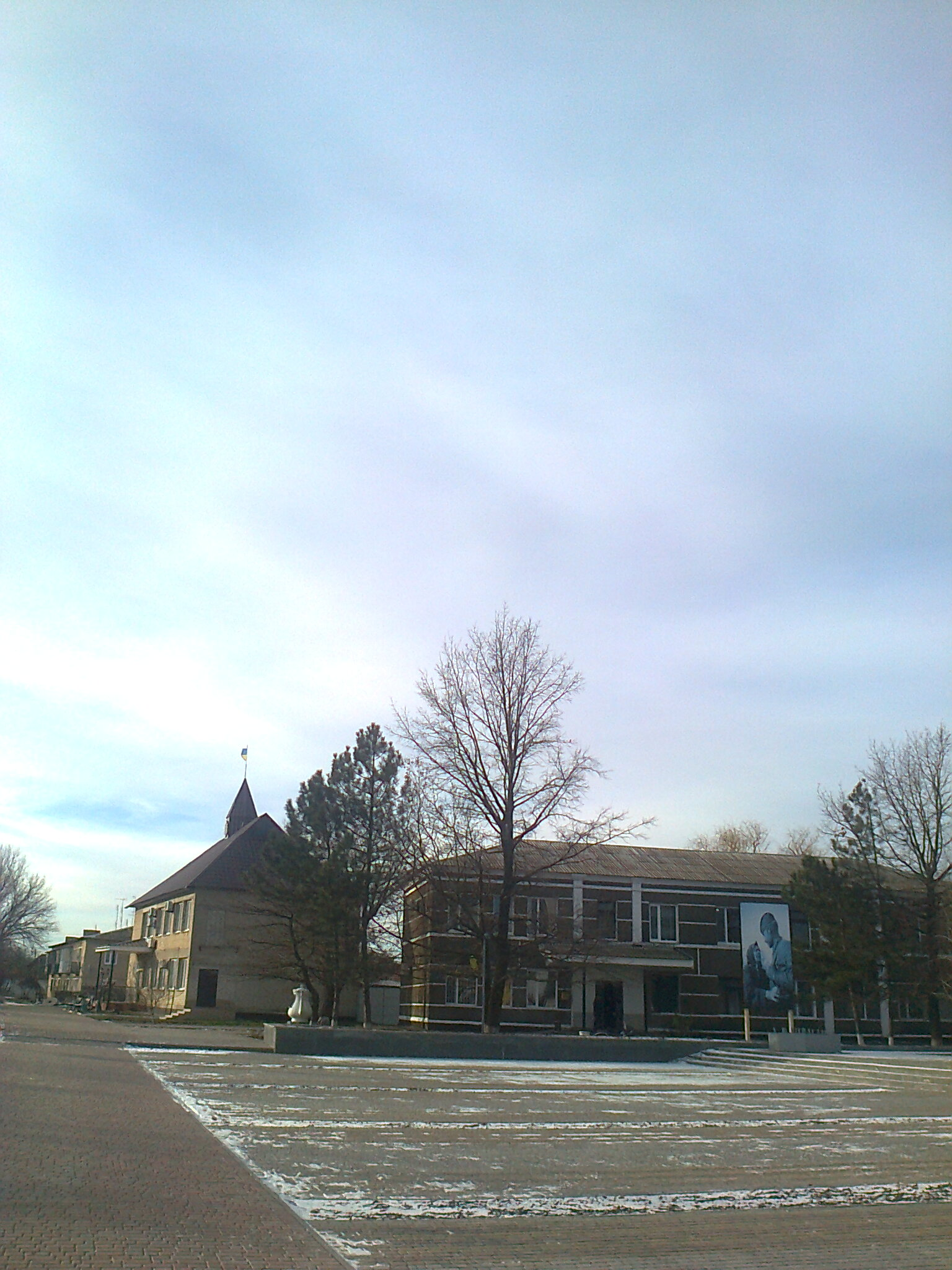 пгт. Весёлое